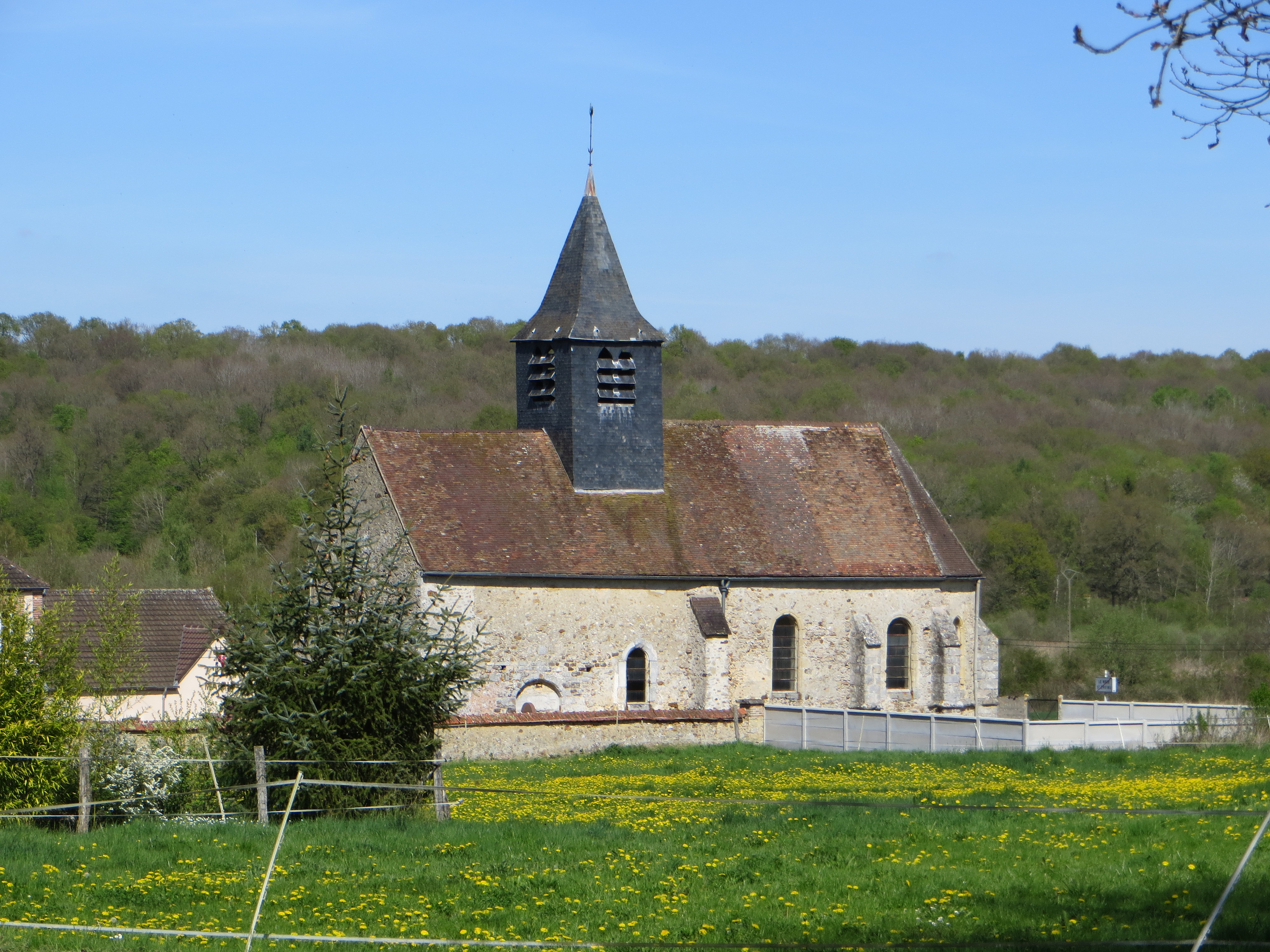 Vue générale de l'église